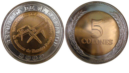 5 colones salvadoreños que nunca circularon